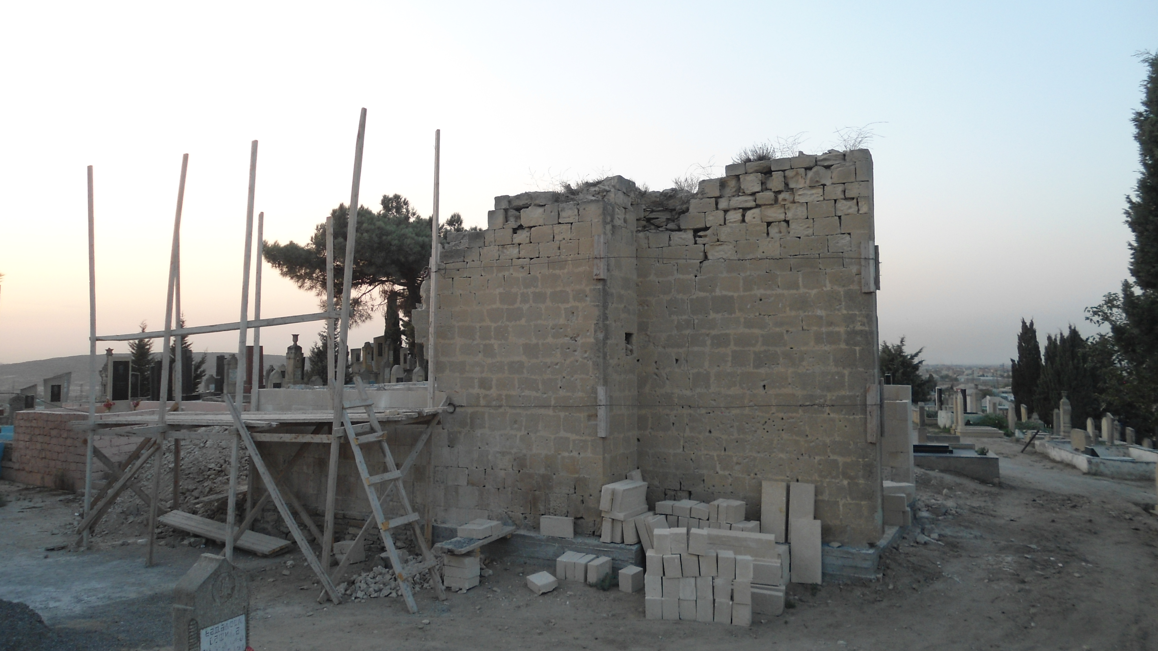 1385-ci ildə usta Arif tərəfindən inşa edilmiş Hacı Şəlalə abidəsi .Bu abidə kvadrat şəkilli tağ-tavanlı kiçik otaqdan və onun qarşısındakı dərin piştağdan ibarətdir